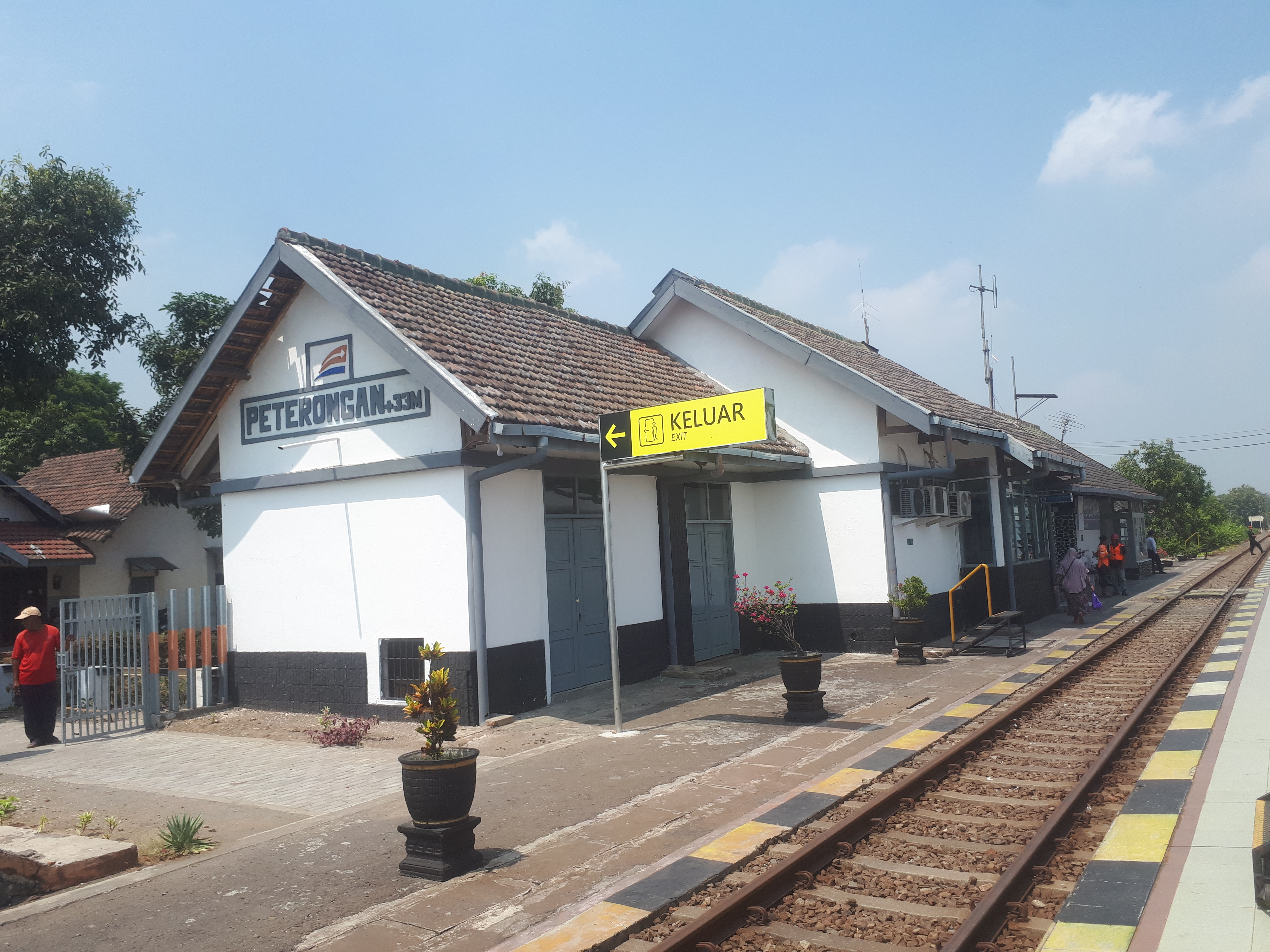 Stasiun Peterongan tahun 2019.